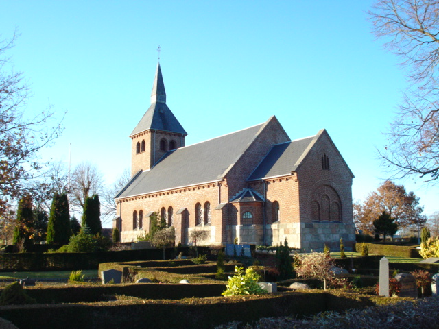 Karlby Kirke